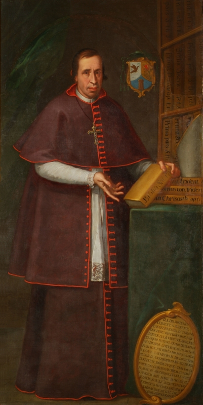 Retrato del eclesiástico español Josep Climent (1706-1781), que fue obispo de Barcelona.